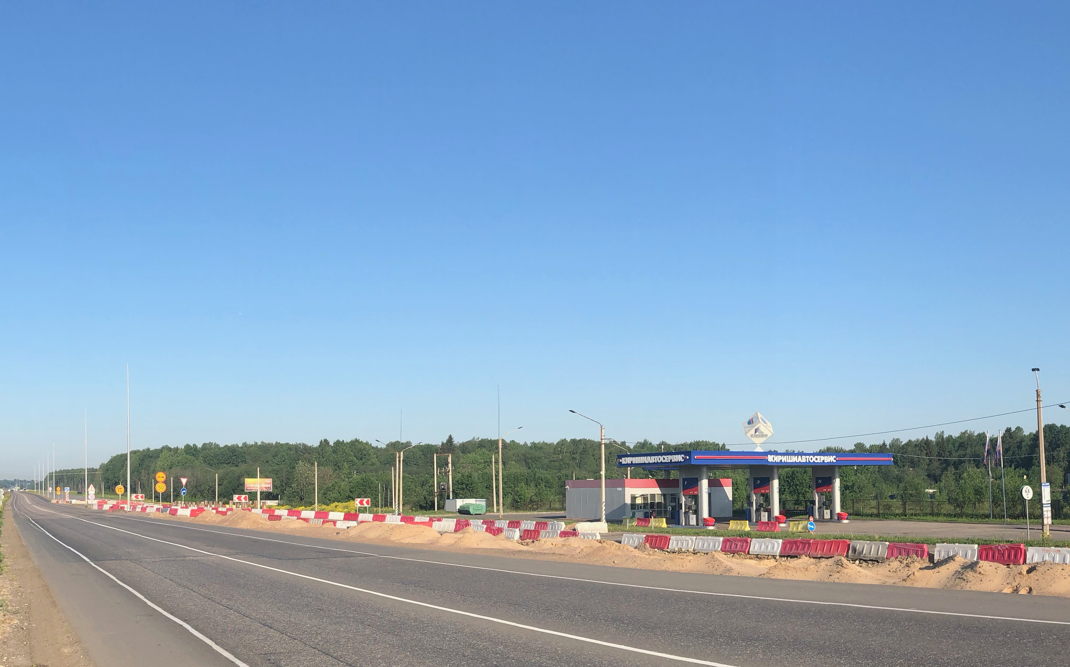 АЗС на М20